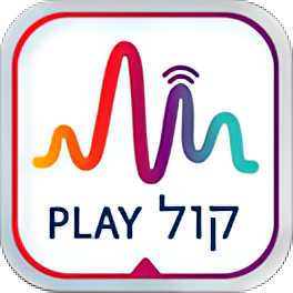 סמליל רדיו קול פליי